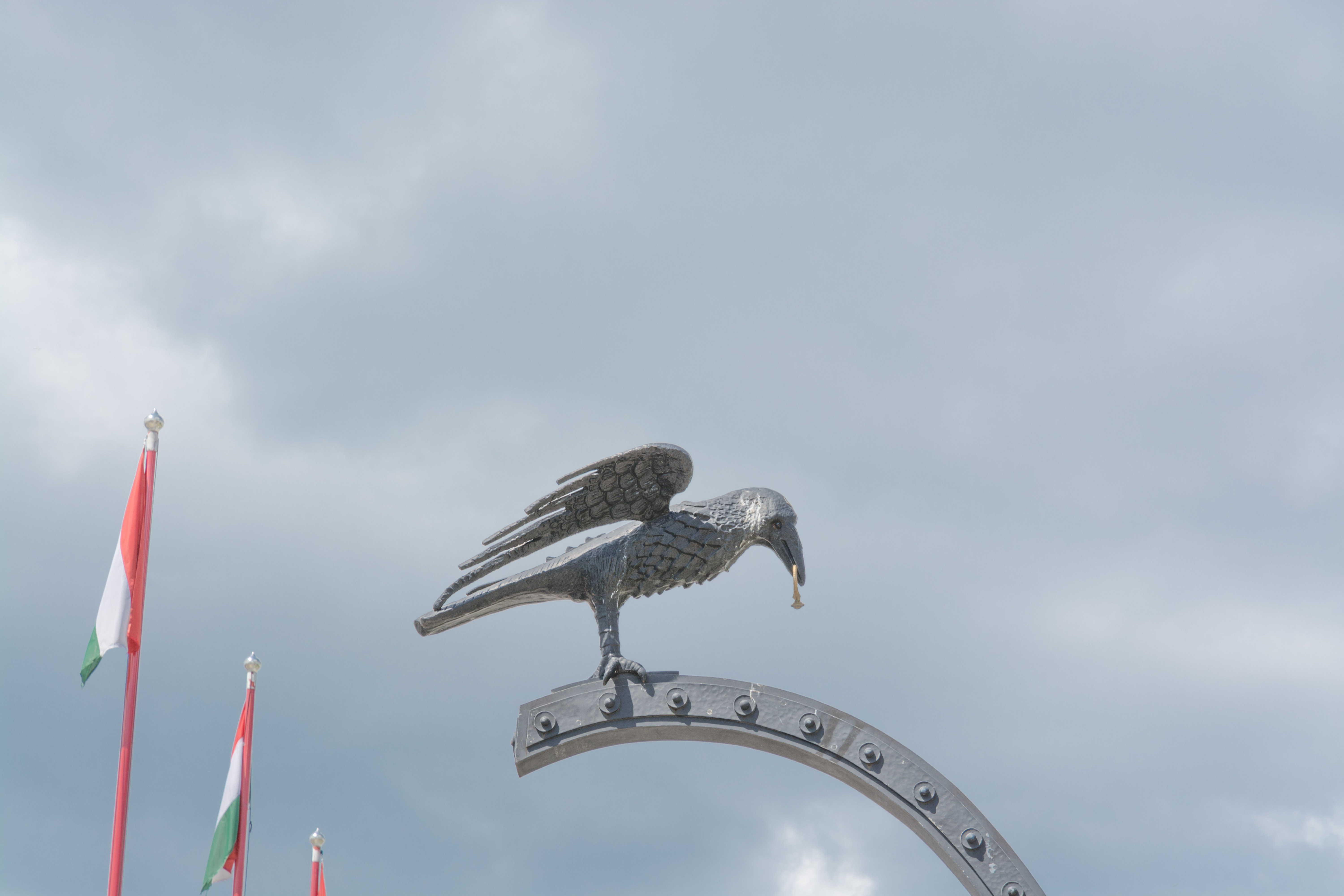 Budapest